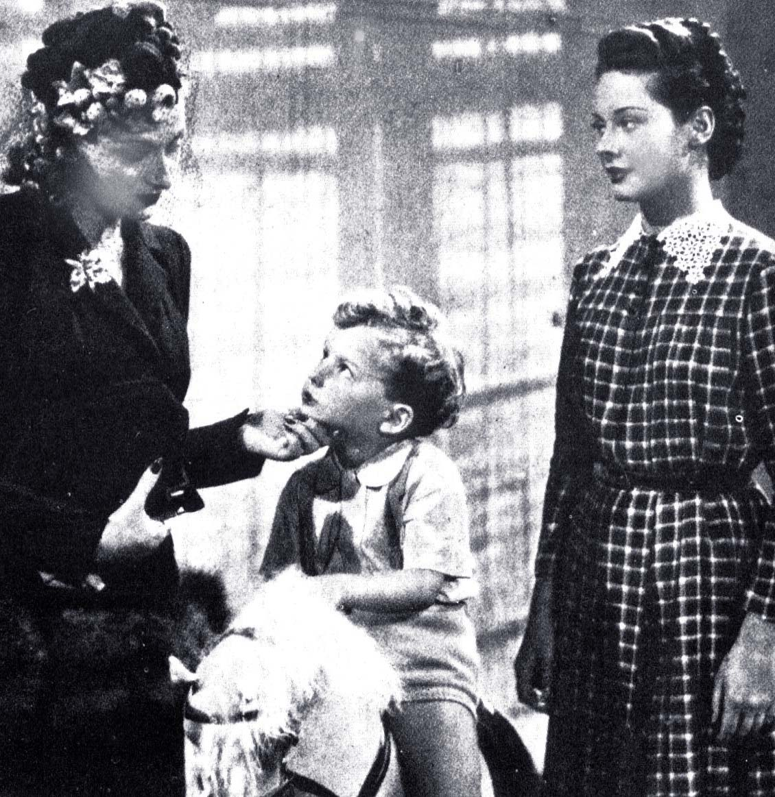 Evi Maltagliati, il piccolo Silverio Pisu e Maria Denis in "Sissignora" (Poggioli, 1941)